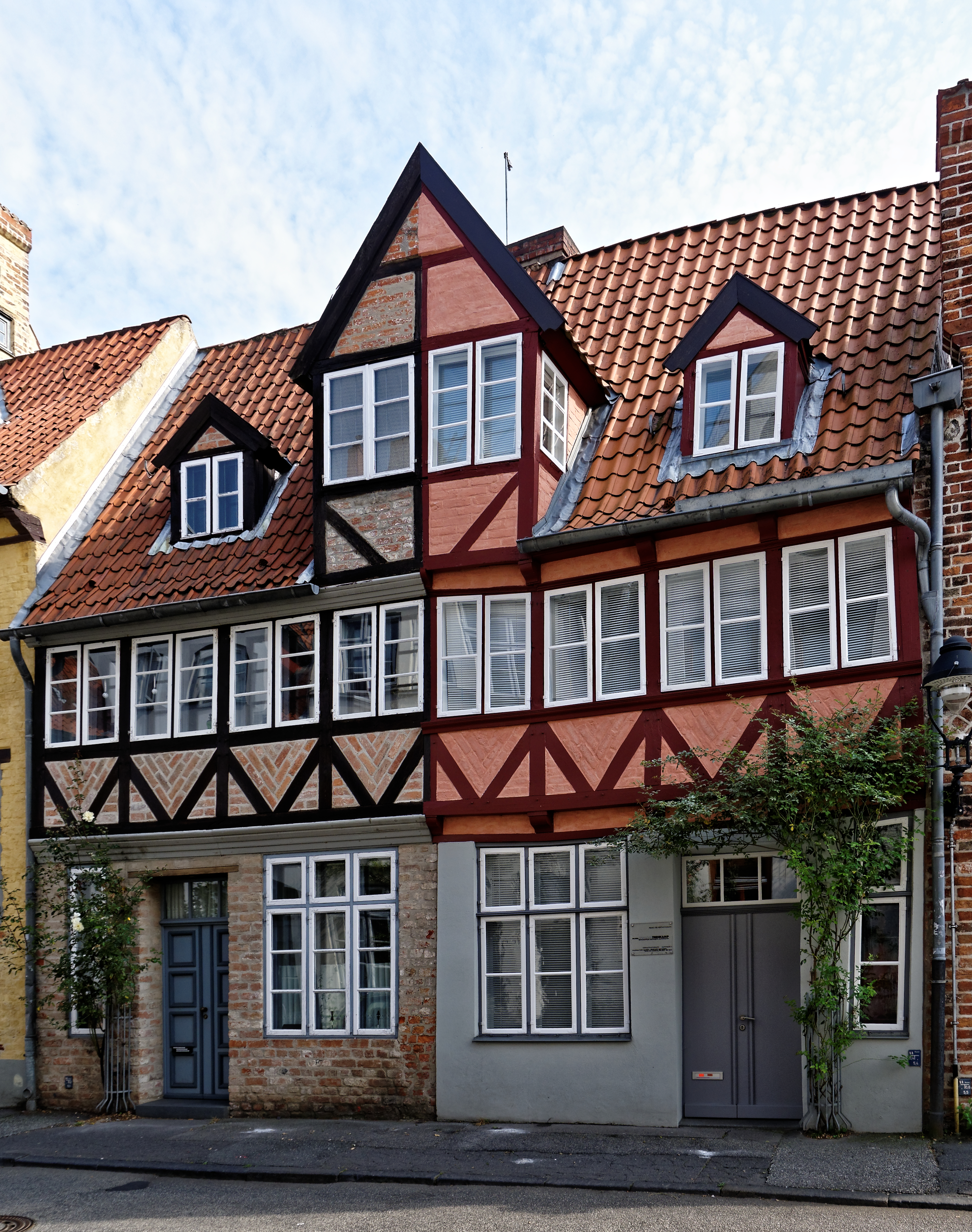 Rosenstraße 1–3